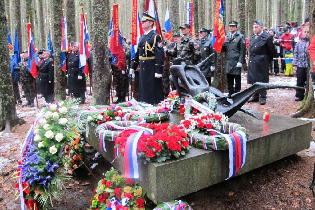 Spominska komemoracija ob obletnici padca Pohorskega bataljona na Osankarici.